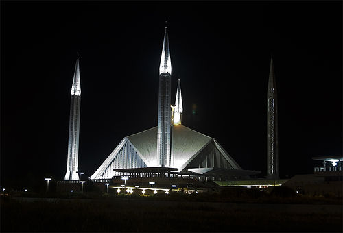 Imran wazeer, Shah Faisal Masjid